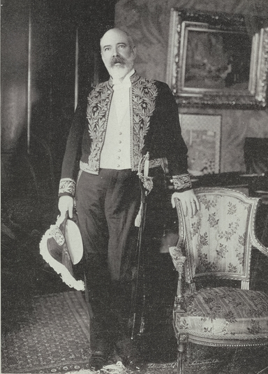 Excmo señor don Carlos Morla Vicuña, monistro de Chile en Washington. Fallecido en Buffalo el 20 de Agosto de 1901. Carlos Morla Vicuña (nacido Carlos María Vicuña Zaldívar; Santiago, 1846-Búfalo, Estados Unidos; 1900) fue un político conservador y diplomático chileno.